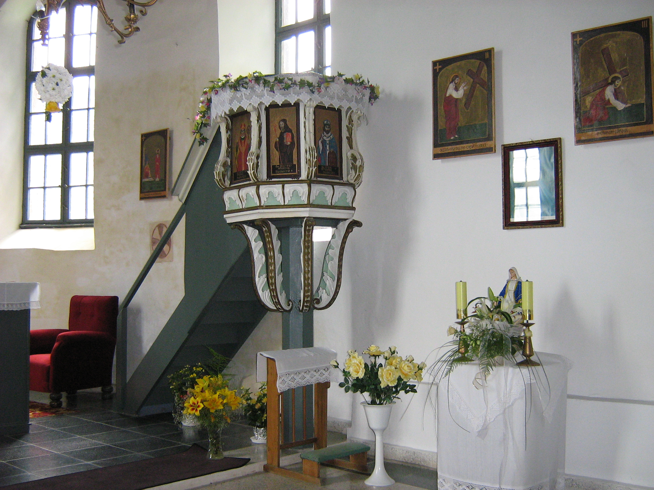 Ambona w Kościele Matki Boskiej Częstochowskiej w Koniewie